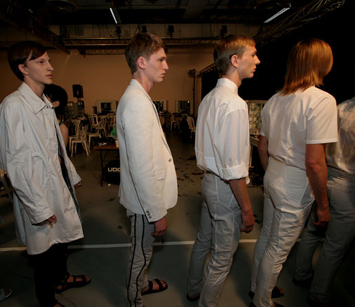 backstage de raf simmon otoño 2007